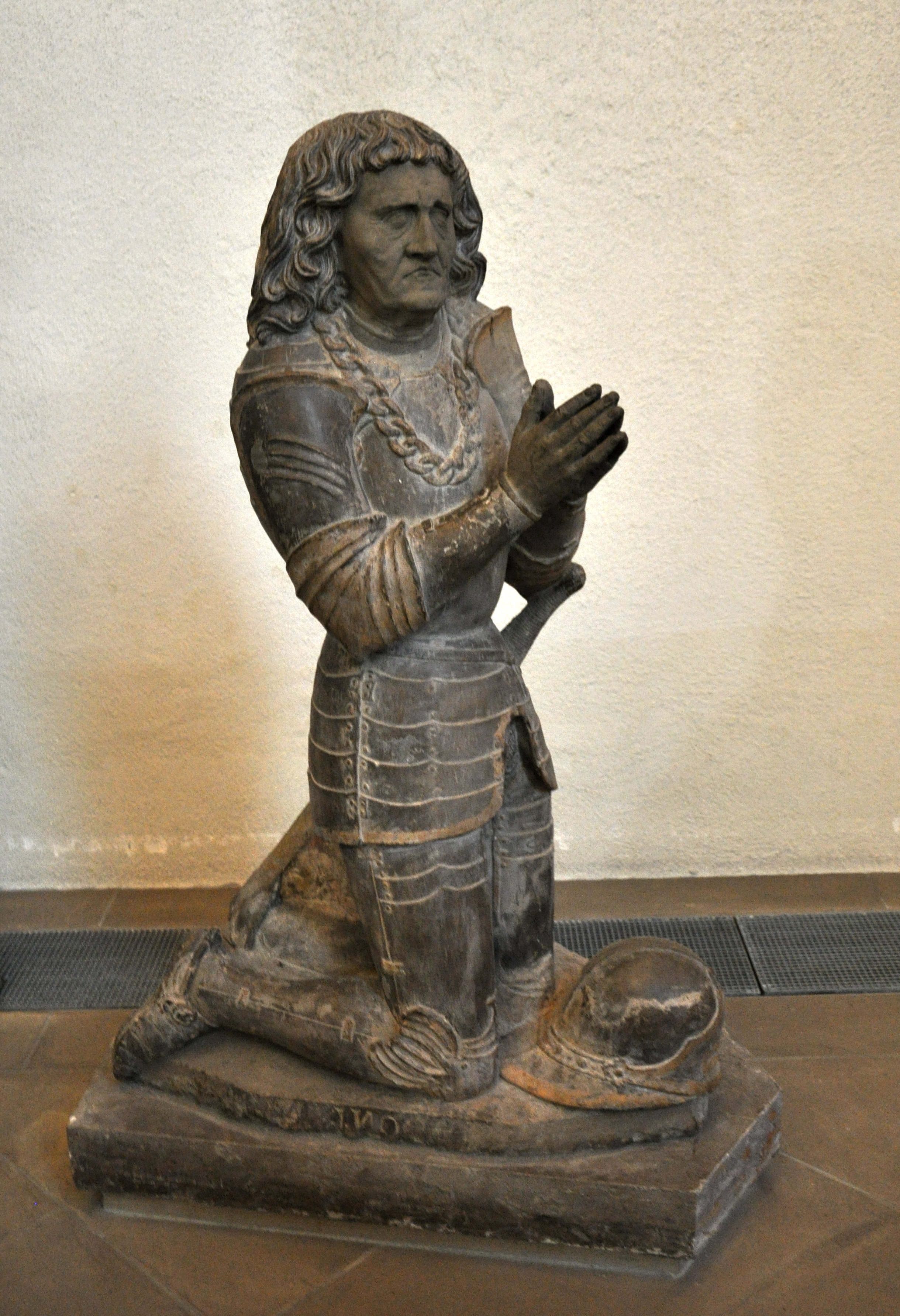 Stuttgart, Stiftskirche, „Betender Ritter“ im Chor, Portrait des württembergischen Landhofmeisters Hermann von Sachsenheim (1430–1508)